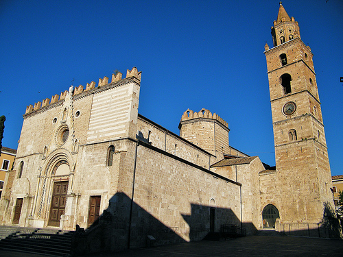 Cattedrale di San Berardo (XII sec.) - facciata di Piazza Orsini